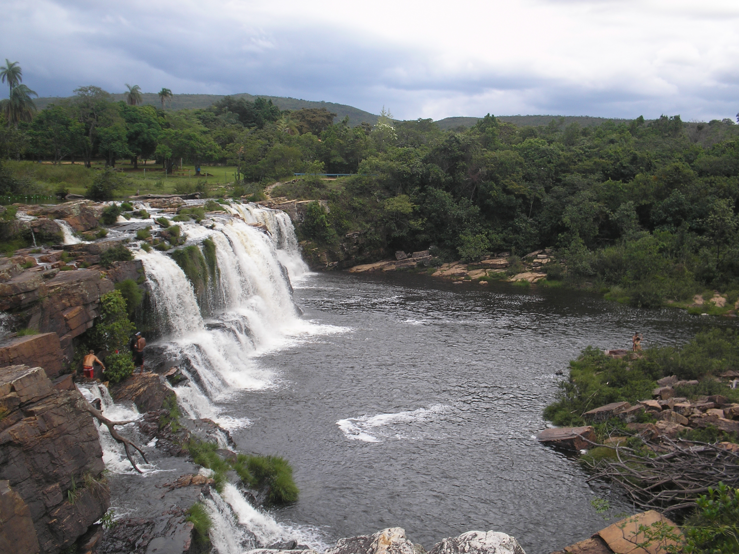 Viata da Cachoeira Grande na Serra ddo Cipó,MG.